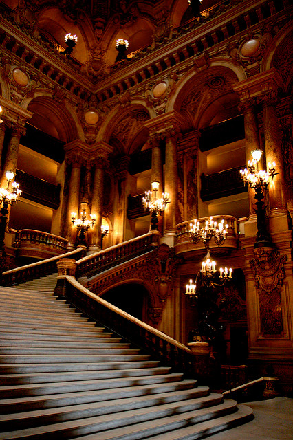 Le grand escalier du Palais Garnier